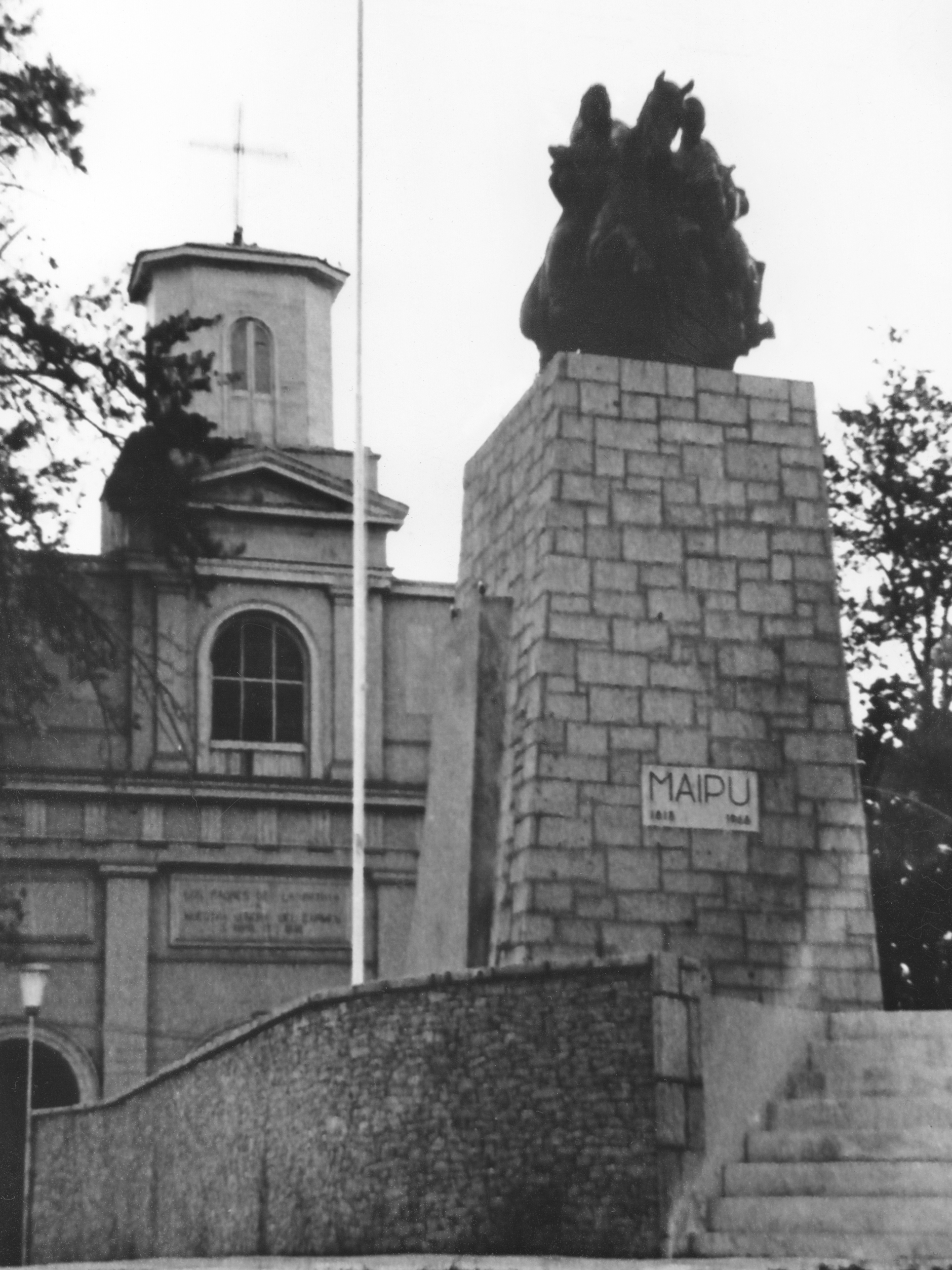 La fachada del antiguo Templo Votivo de Maipú (Capilla de la Victoria) en la comuna de Maipú en Santiago de Chile. Fotografía tomada en los años 1940, escaneada y retocada con Adobre Photoshop 7.